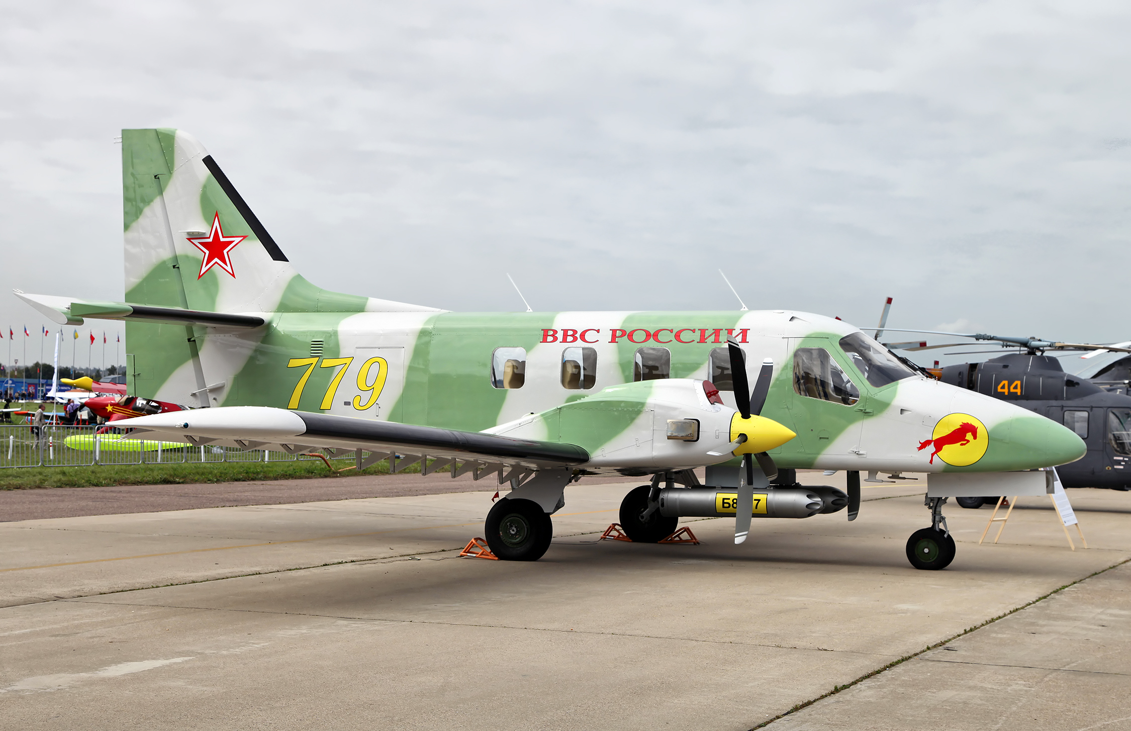 Легкий многоцелевой самолет Рысачок (Light aircraft Rysachok)